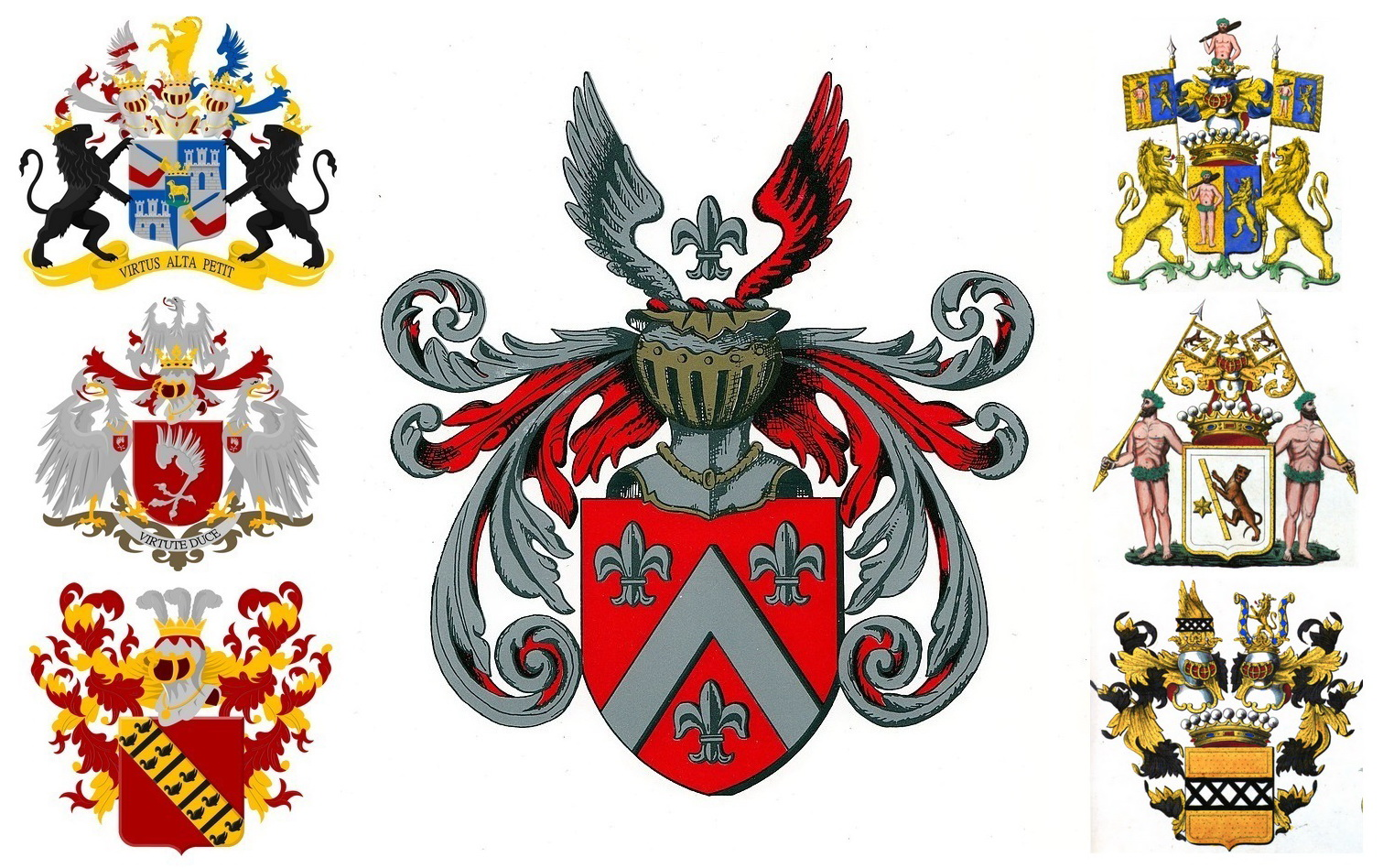 Familiewapens van de familie Regout en zes adellijke families, waarmee zij door huwelijken verbonden waren. Links: Von Scheibler, Rendorp en Van der Maesen de Sombreff. Rechts: De Sauvage, De Spirlet en De Moffarts. Voor deze montage is gebruik gemaakt van rechtenvrije afbeeldingen op Wikimedia Commons: File:Von_Scheibler_wapen.svg File:Rendorp_wapen_1914.png File:Van_der_Maesen_de_Sombreff_wapen.png File:Familiewapen_Regout.jpg File:Armoiries_de_la_famille_de_Sauvage_Vercour.png File:Armoiries_de_la_famille_de_Spirlet.png File:Armoiries_de_la_famille_de_Moffarts.png